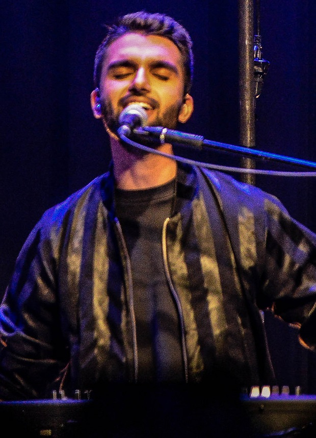 Silva se apresentando no Casa Natura Música em 2017.